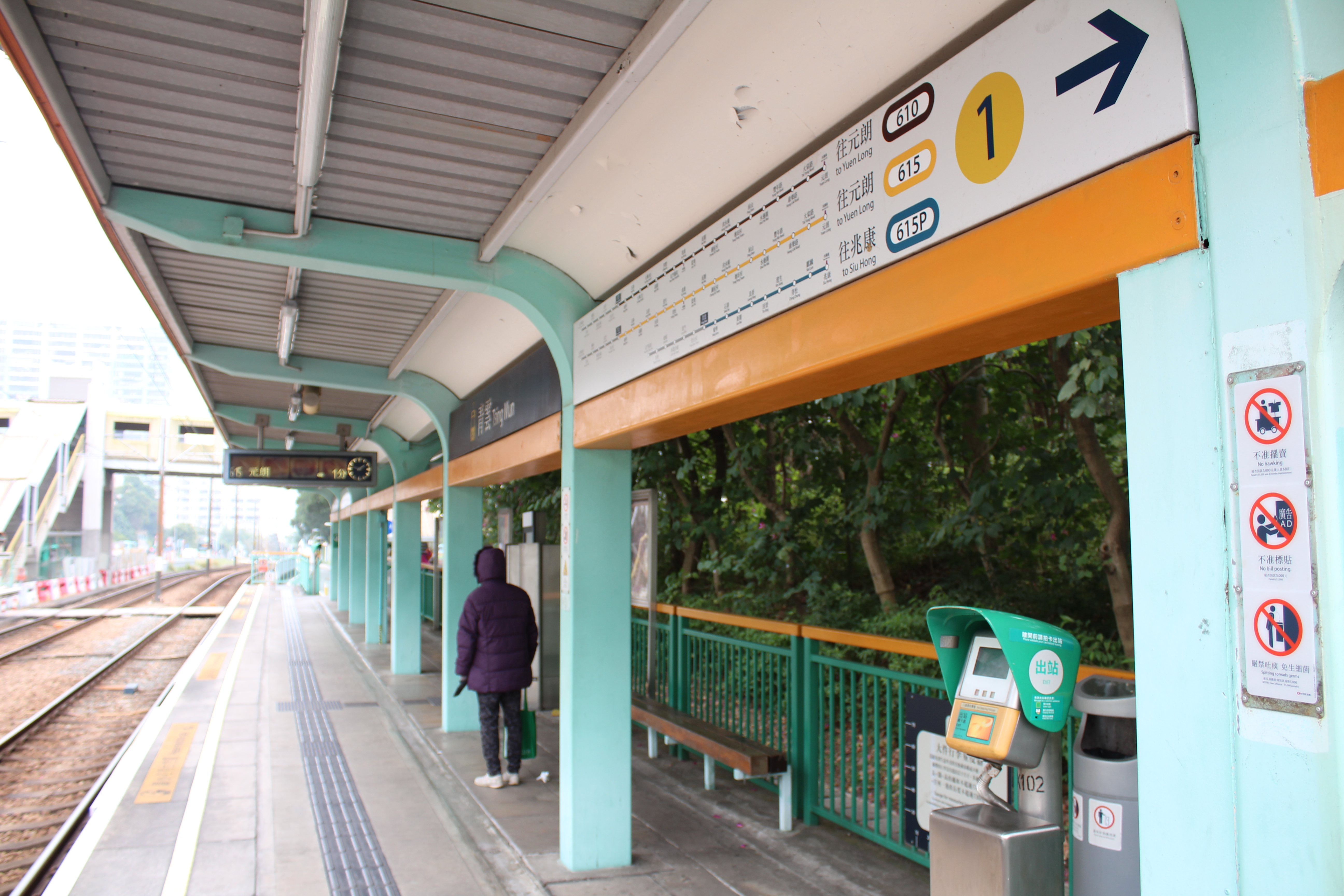 青雲站1號月台